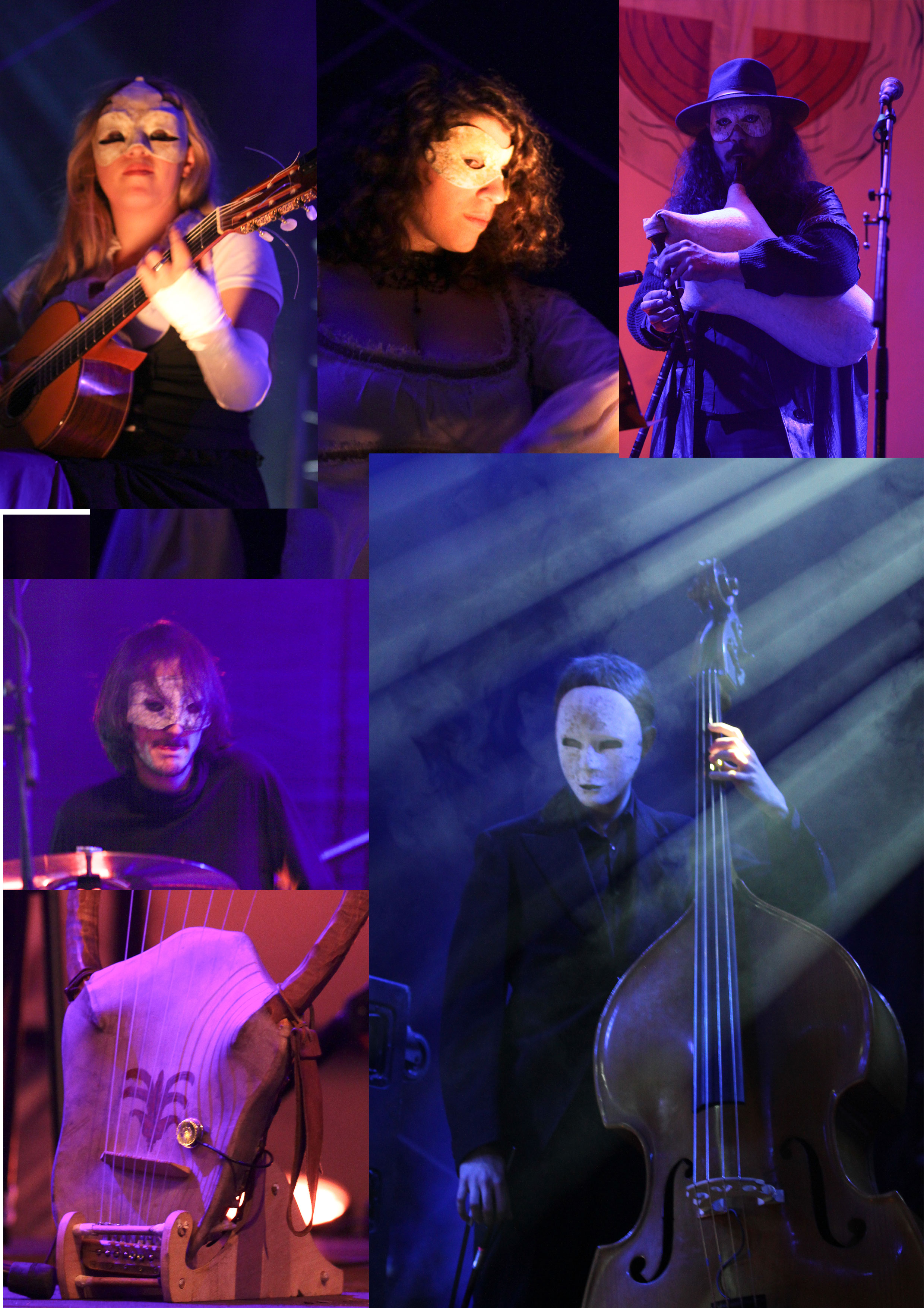 Daemonia Nymphe (Δαιμόνια Νύμφη) auf dem Wave-Gotik-Treffen 2013 in Leipzig, Heidnisches Dorf.